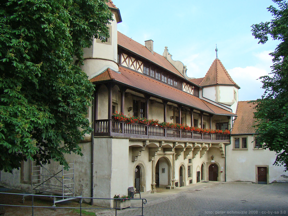 Graf-Eberstein-Schloss in Kraichtal-Gochsheim, einstger Innenhof zum Hinteren Schloss